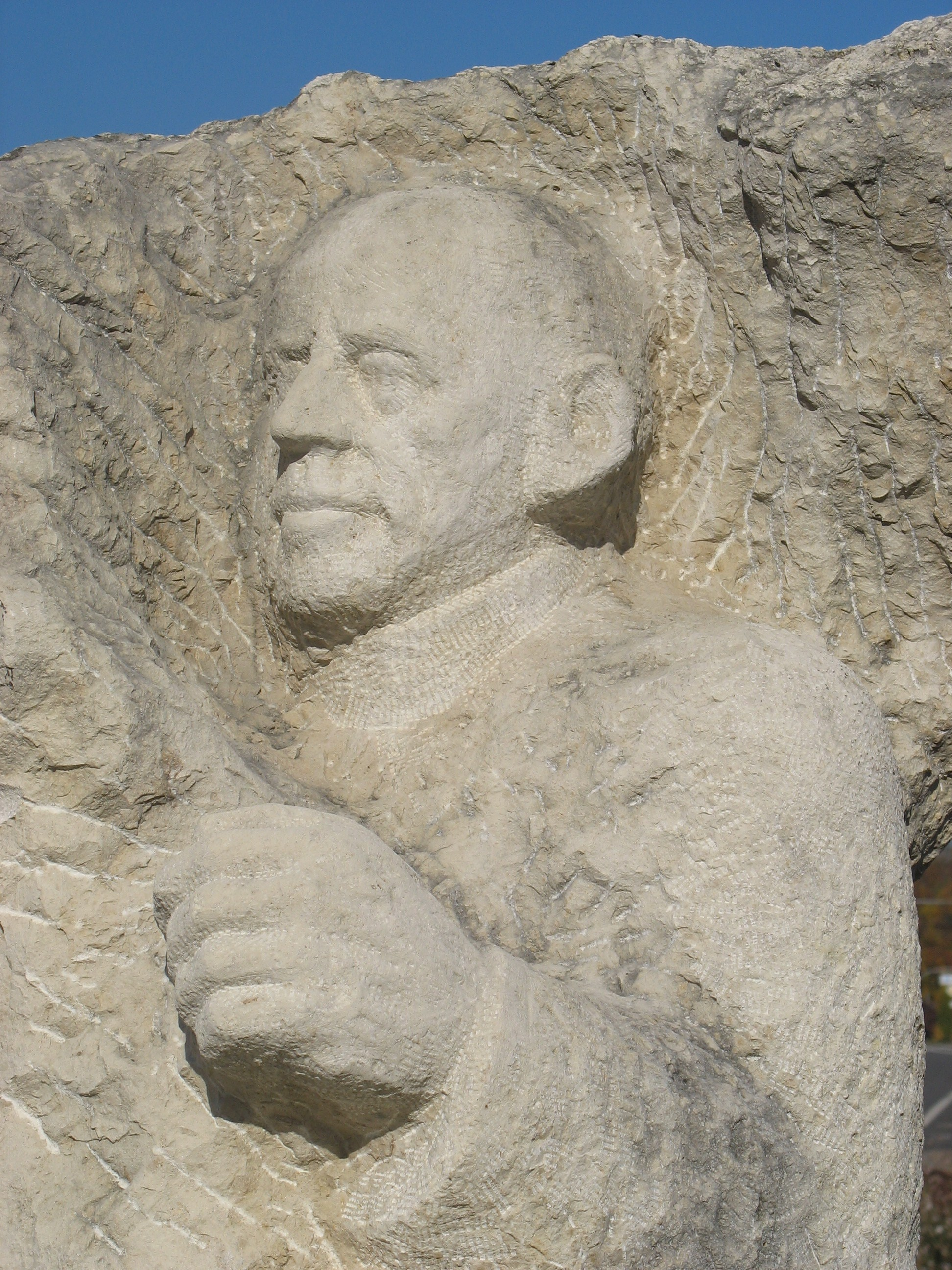 Eugen Bolz-Denkmal am Eugen-Bolz-Platz in Rottenburg. Die Skulptur mit dem herauswachsenden Gesicht meißelte der Künstler Ralf Ehmann 1999 aus einem Jurakalk-Stein. Zusätzliche Informationen zu der ganzen Skulptur befinden sich auf der Internet-Seite des Künstlers.